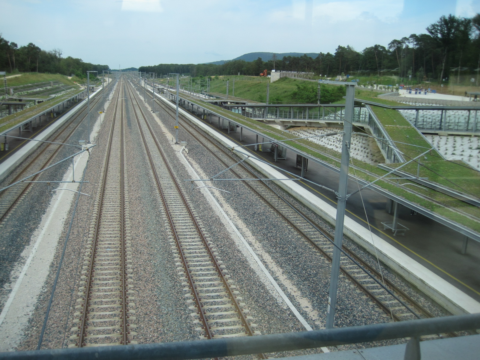 Gare de Besançon-TGV